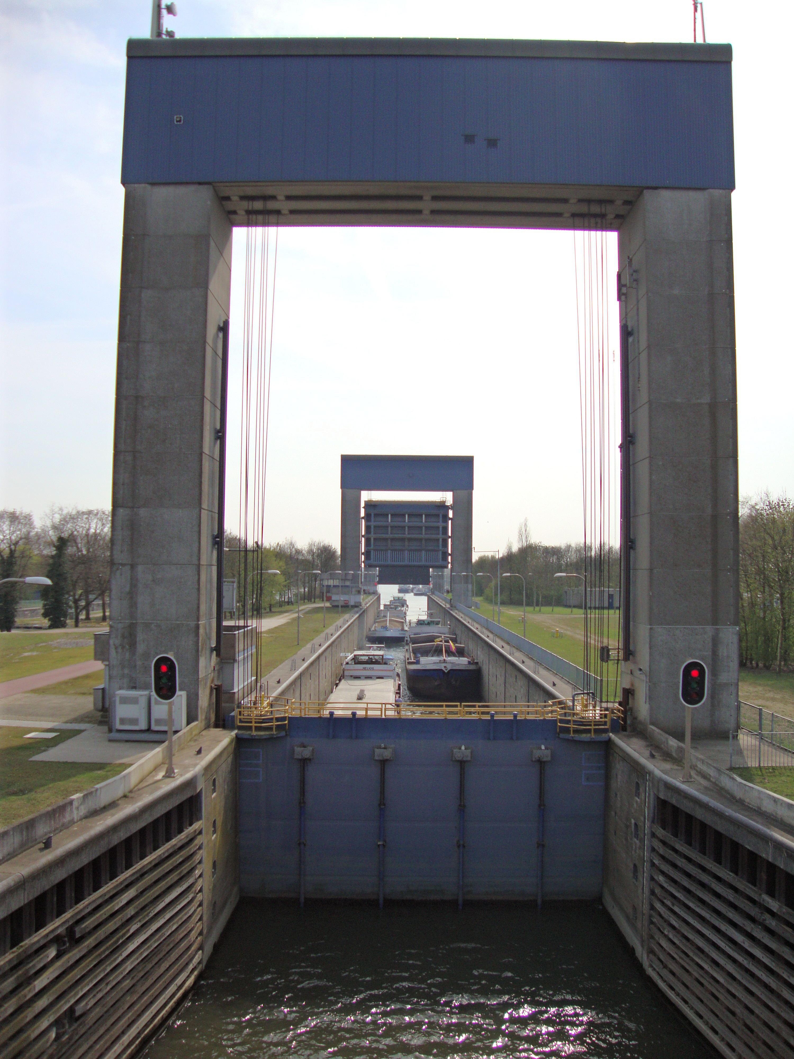 Nijmegen,_sluiscomplex_Weurt,_nieuwe_sluis,_noordzijde_gesloten.